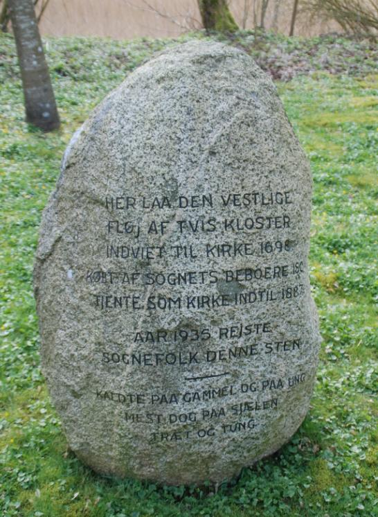 Mindesten ved Tvis Kloster